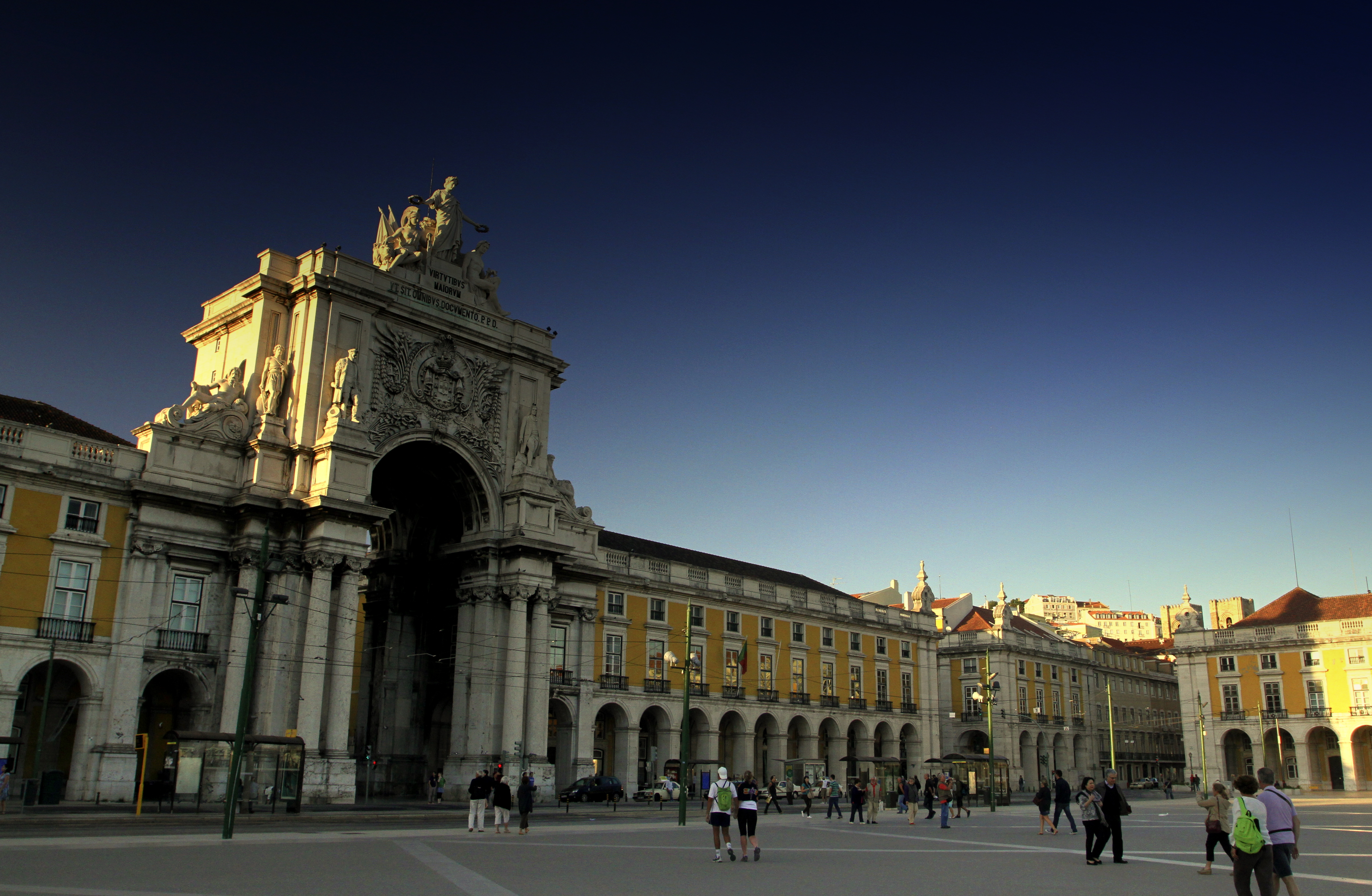 Praça do Comércio - Lisboa This file was uploaded for Wiki Loves Monuments in Portugal with the unique identifier 70275.